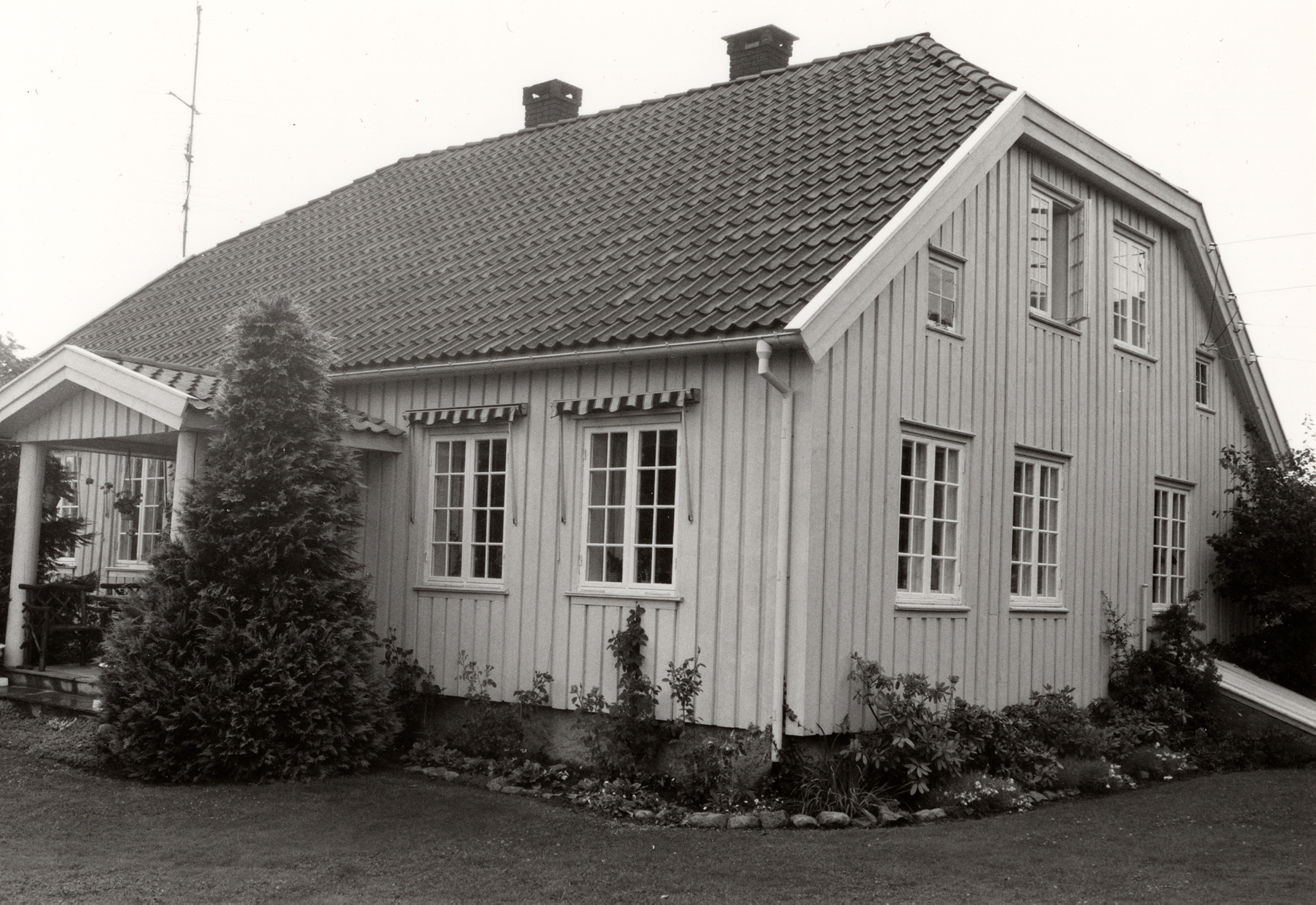 Vestre Ekenes, Nøtterøy.